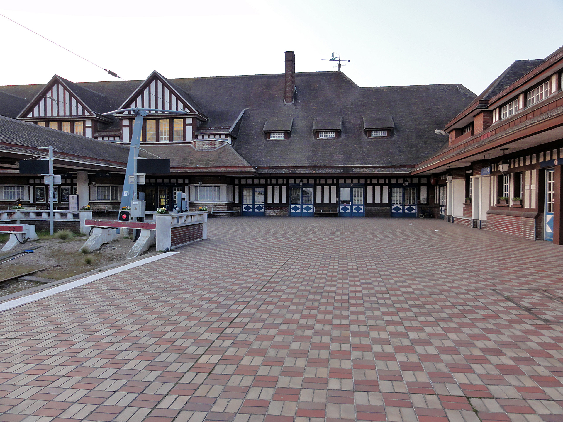 La gare de Trouville - Deauville, Calvados, France.